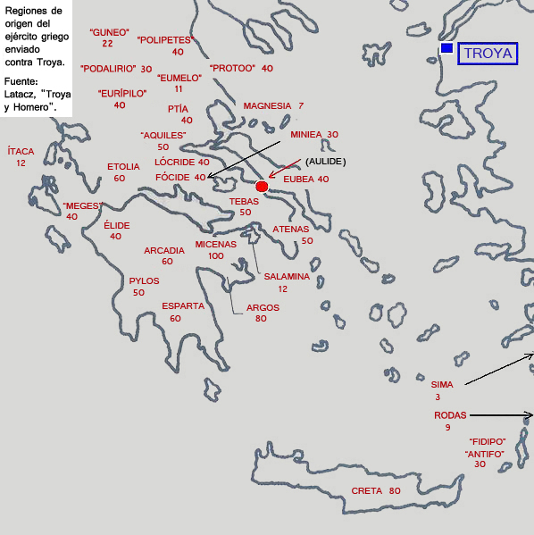 Origen de las fuerzas griegas en Troya.